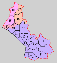 千葉県千葉郡の町村。